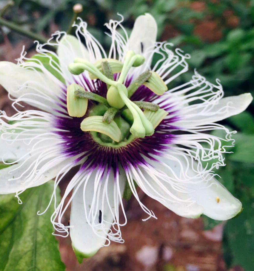 Diretamente da floresta amazônica